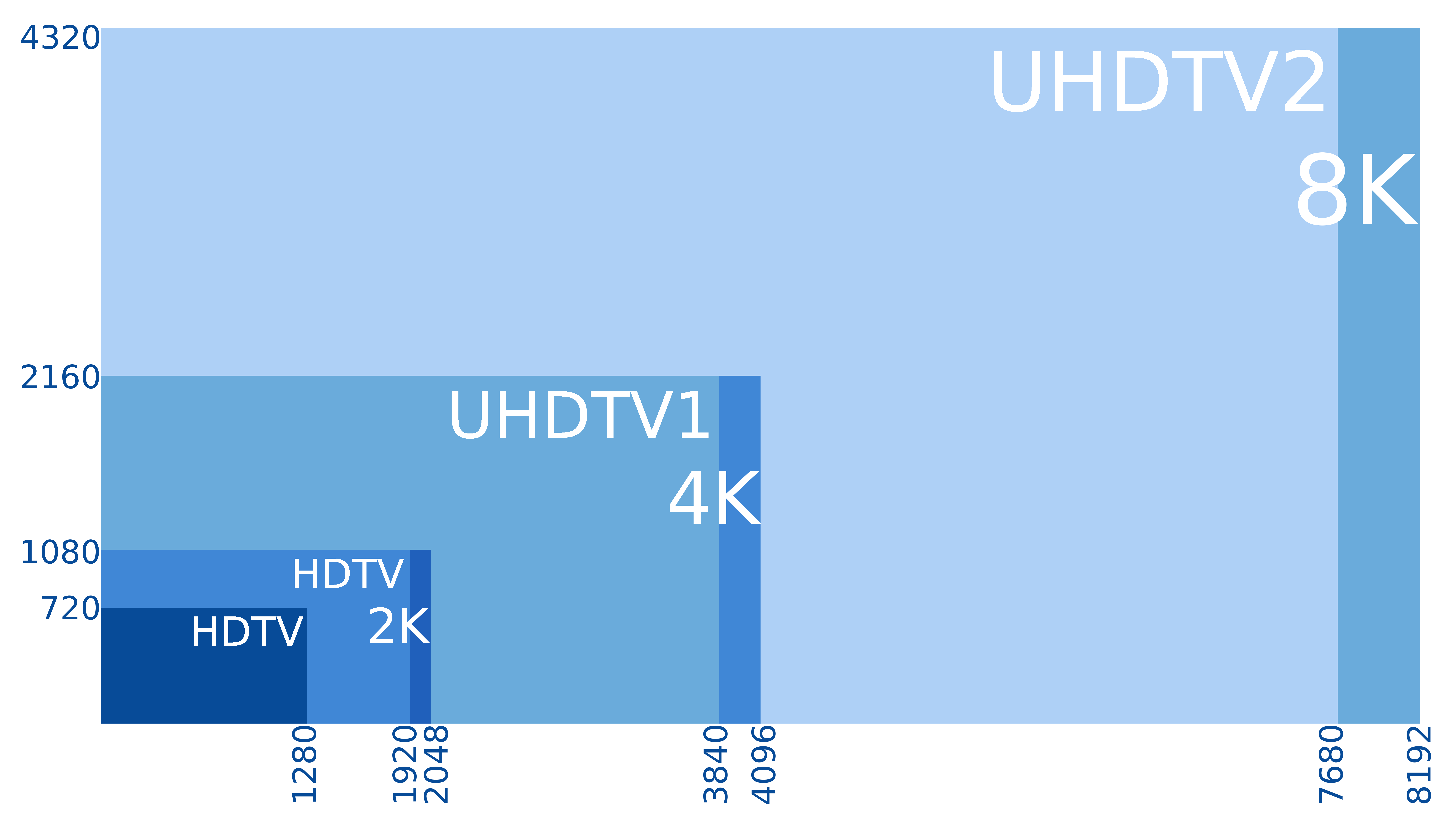 Définitions d'image pour la TV HD et UHD ainsi que pour le cinéma 2K, 4K et 8K